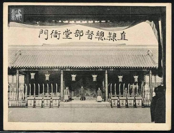 保定直隶总督府大堂老照片